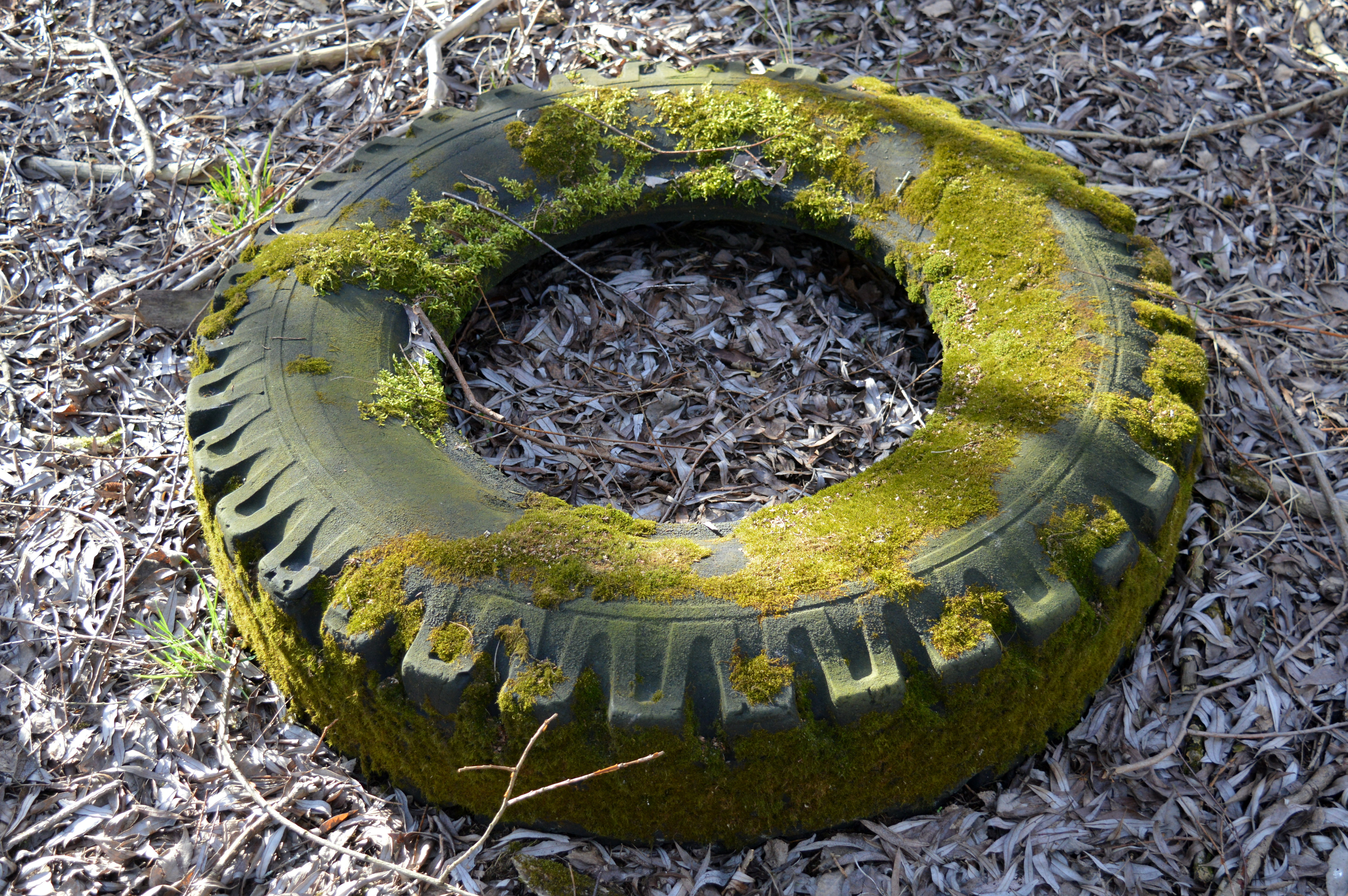 Landschaftsschutzgebiet Ehemalige Kiesgrube Klaus - Futterstelle (2)